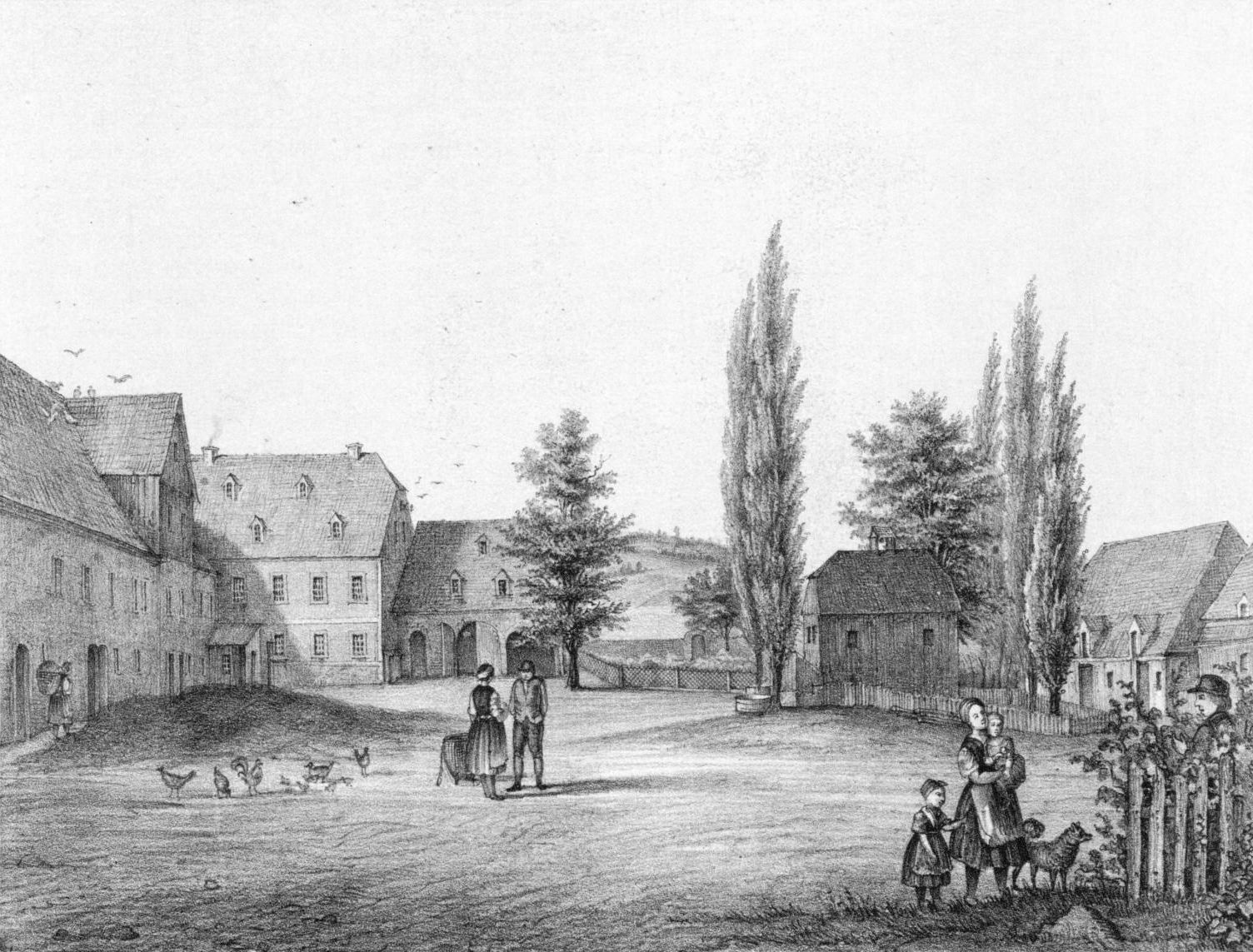 Rittergut Niederzwönitz im Erzgebirge